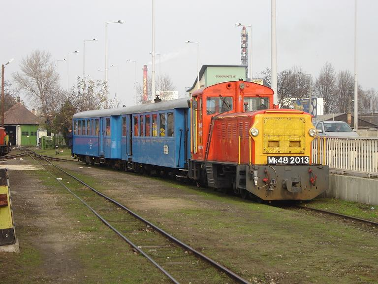 Mk48-as mozdony két kocsival a Kecskeméti Kisvasút állomásán